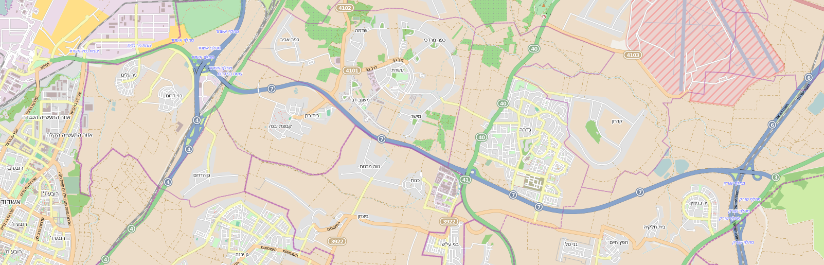 Map A7 IL